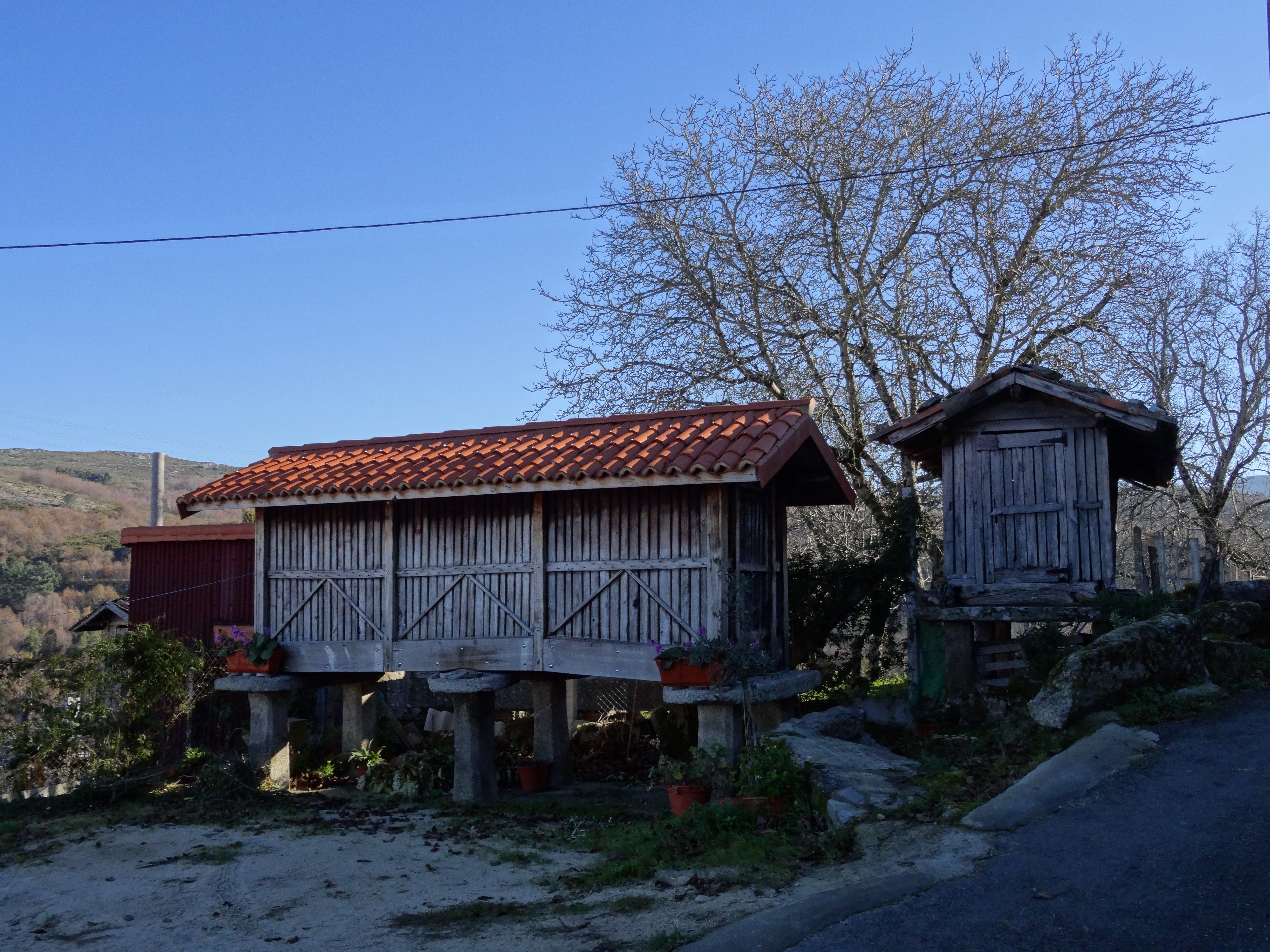 Ver título.